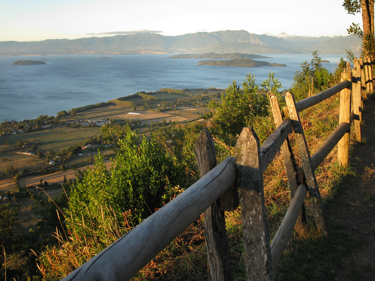 Blick auf den Lago Ranco vom Mirador Piedra Mesa, Chile.